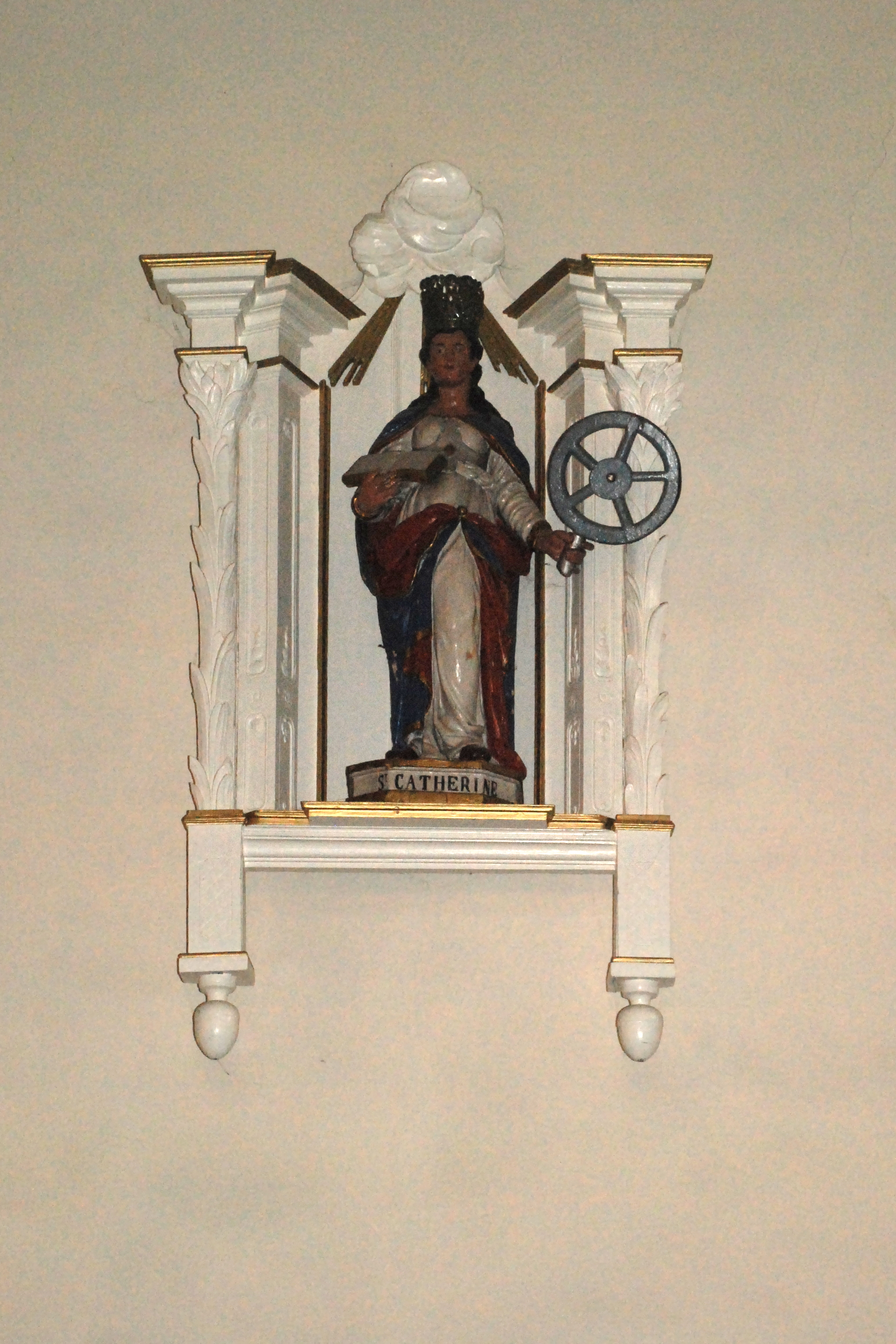 Belgique - Province de Namur - Viroinval - Nismes - église Saint-Lambert (1829)